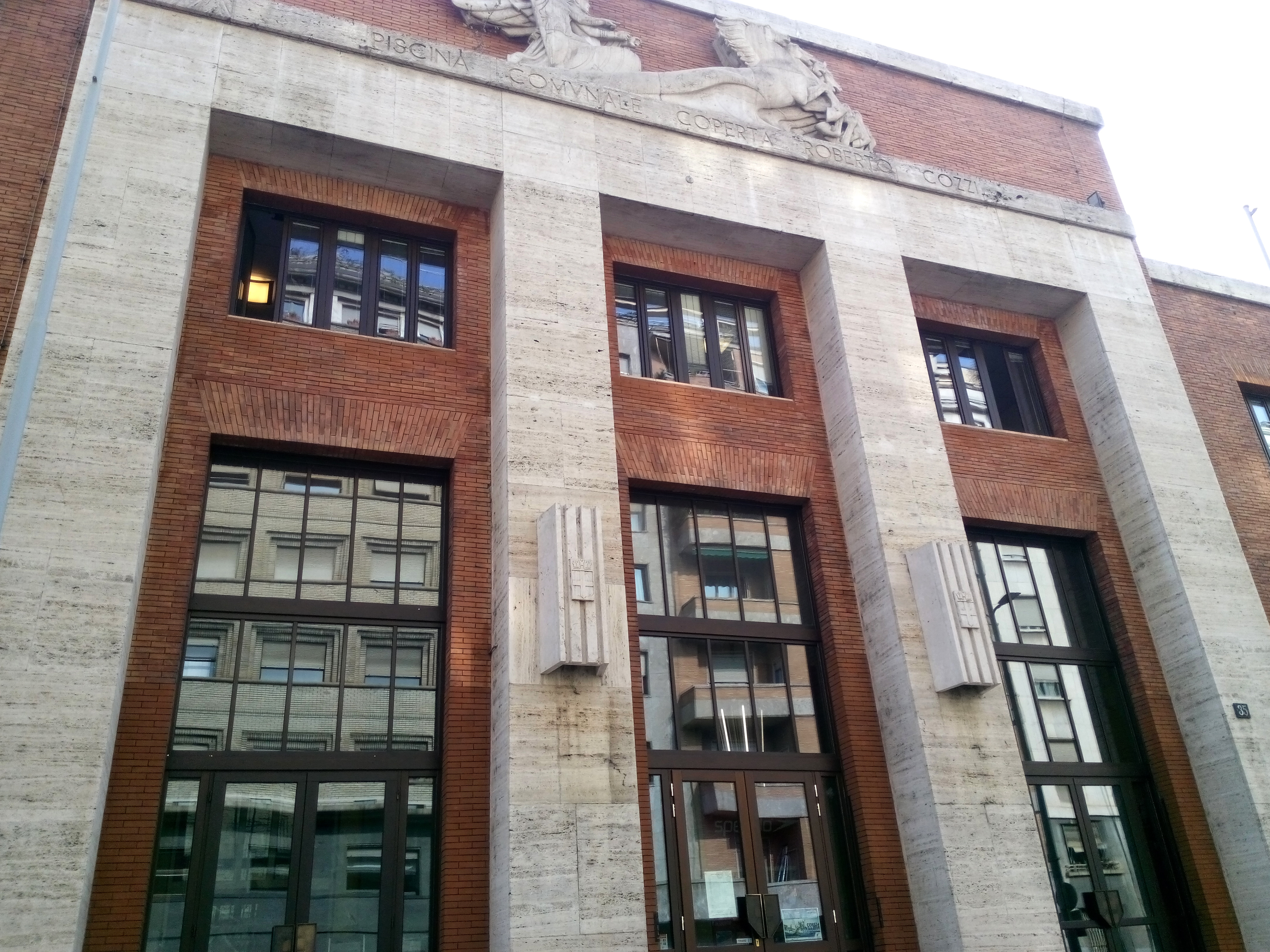 Piscina Cozzi - Milano This is a photo of a monument which is part of cultural heritage of Italy.